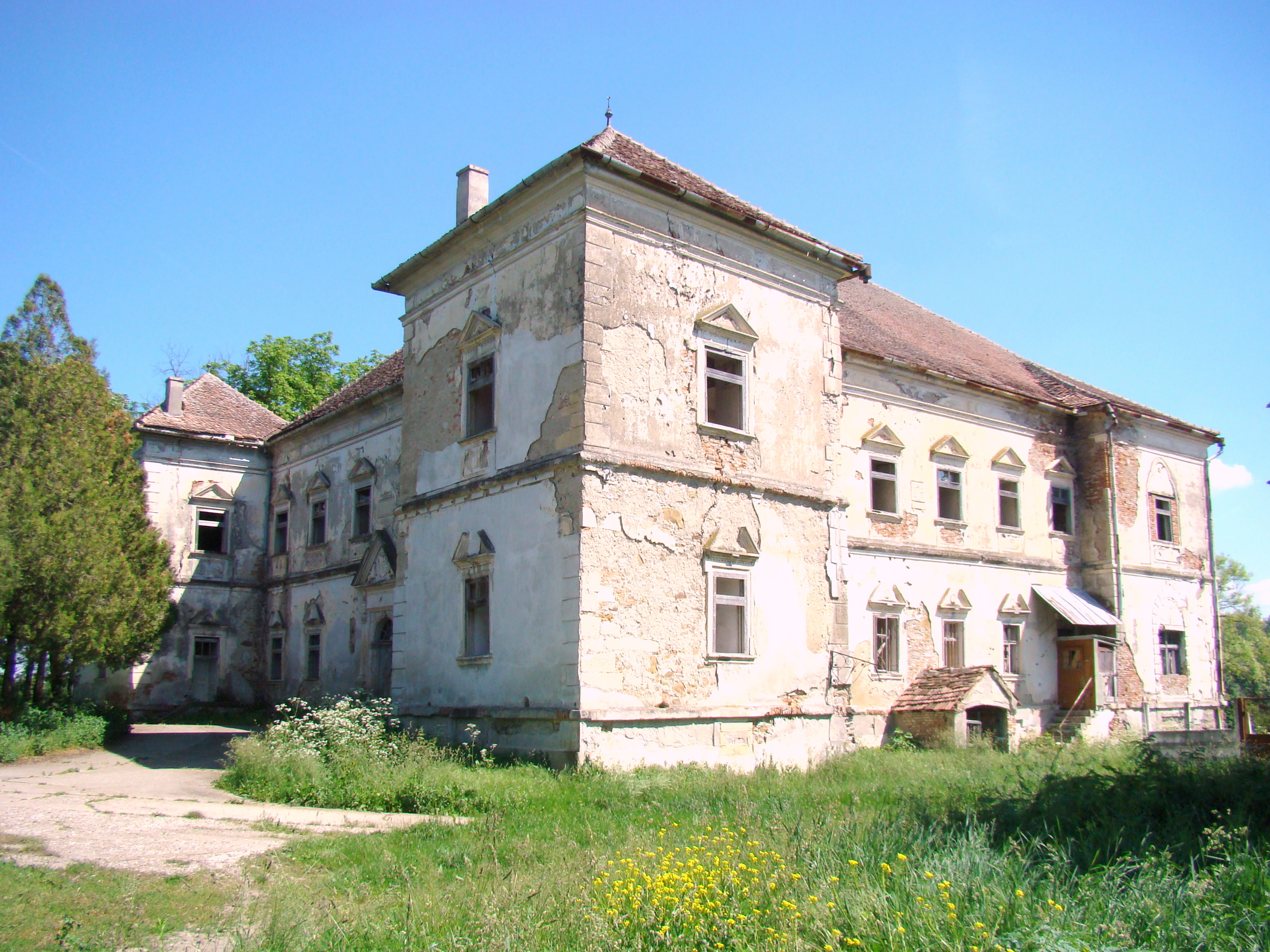 Castelul Bethlen, sat Sânmiclăuș; comuna Șona 01